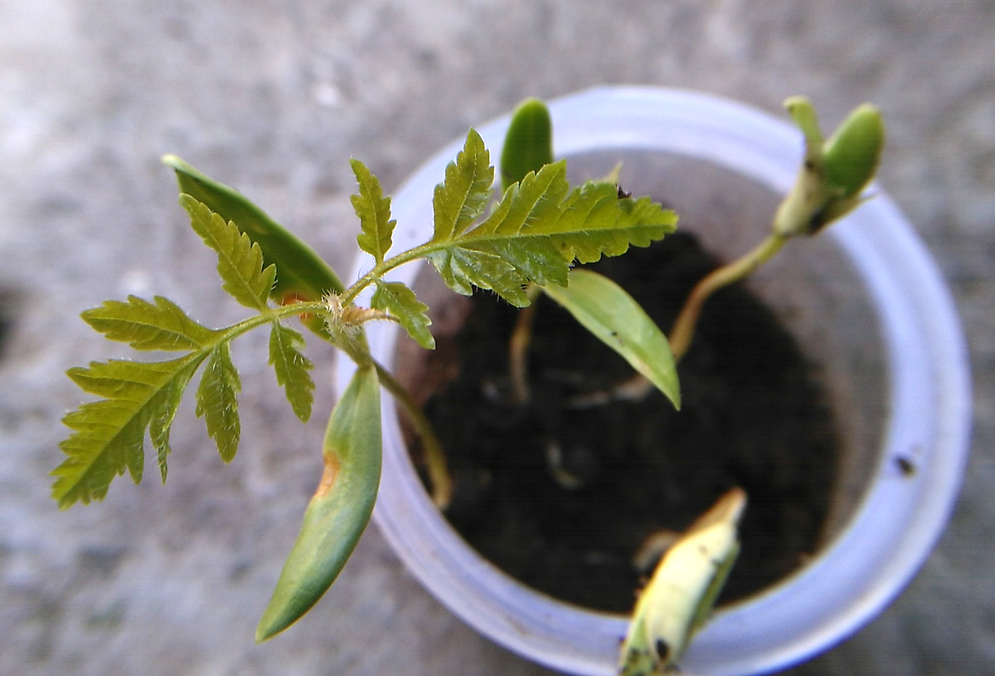 Jeunes pousses de Zanthoxylum semés dans un gobelet en plastique ; photo prise juste avant rempotage (les pivots commencent déjà à tourner en rond).